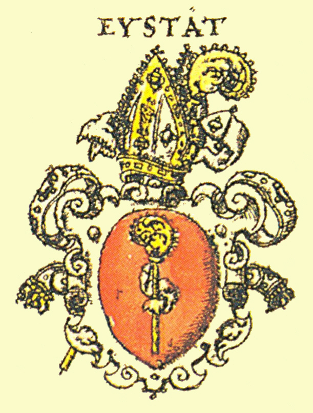 Wappen des Bistums Eichstätt